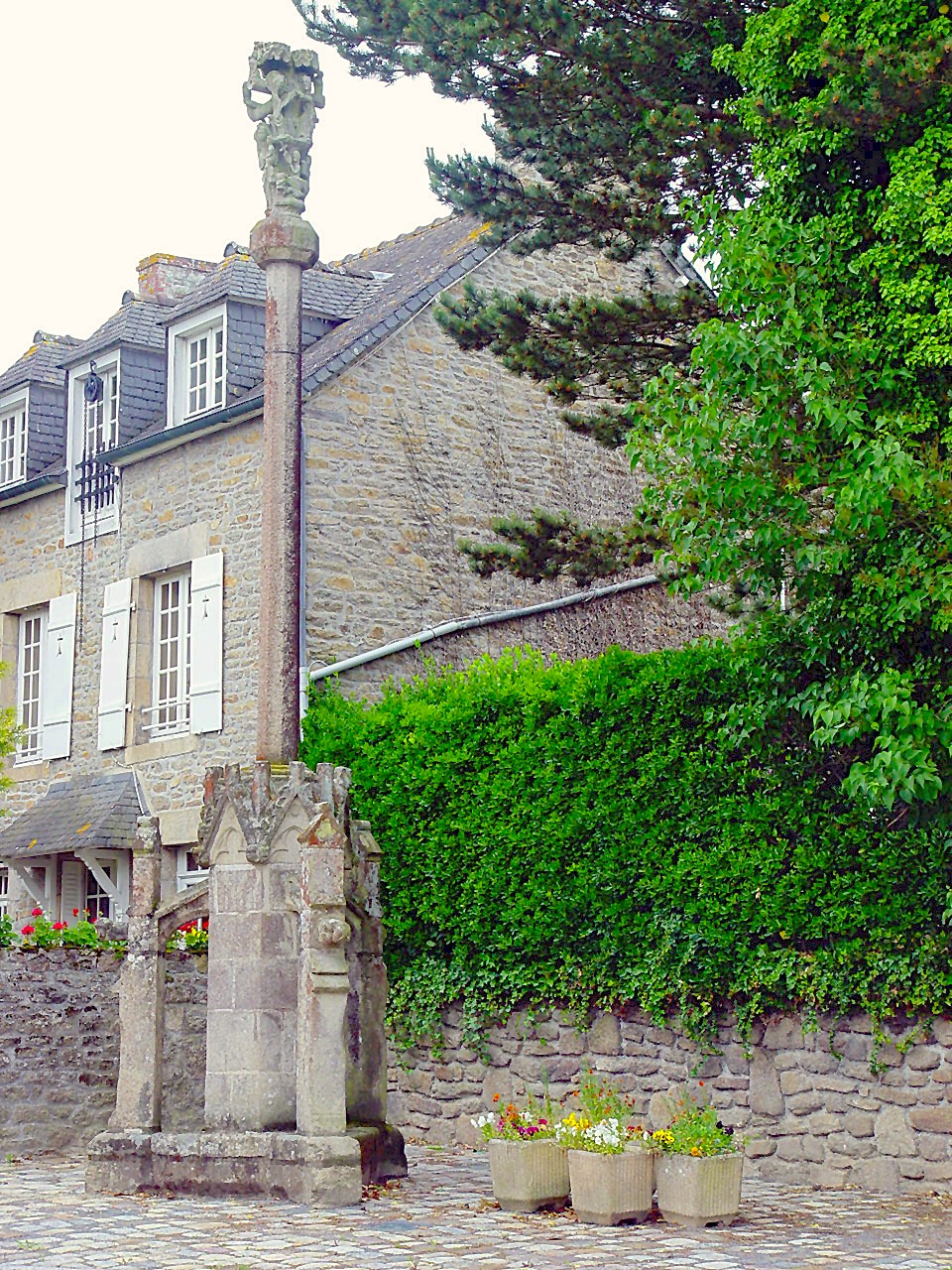 Léhon (Bretagne, Côtes-d'Armor): Calvaire Saint-Esprit, 14. Jahrhundert.